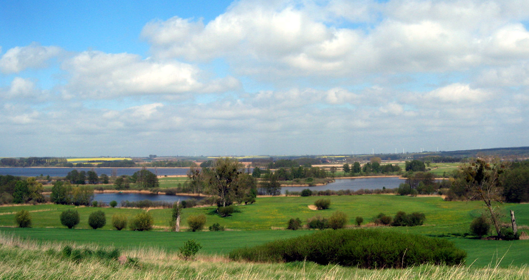 Blick in der Uckermark auf das Uckertal. Der Rastplatz Seenblick liegt an dem Radweg zwischen Potzlow und Fergitz.